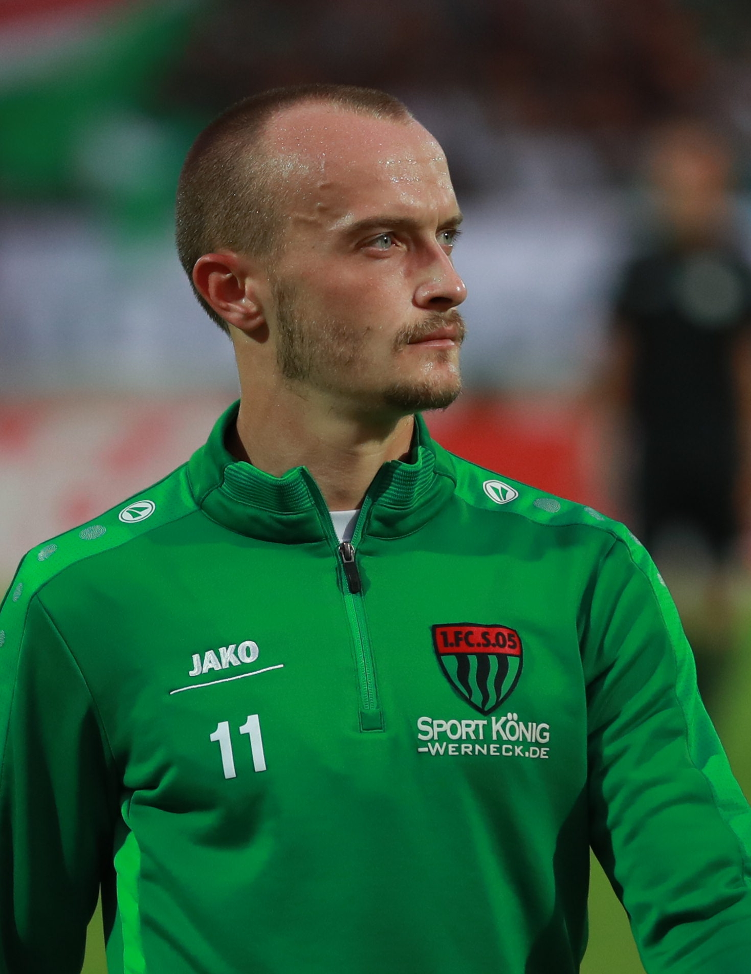 DFB-Pokal 2018/19, 1. Hauptrunde: 1. FC Schweinfurt 05 gegen FC Schalke 04 0:2 (0:1)